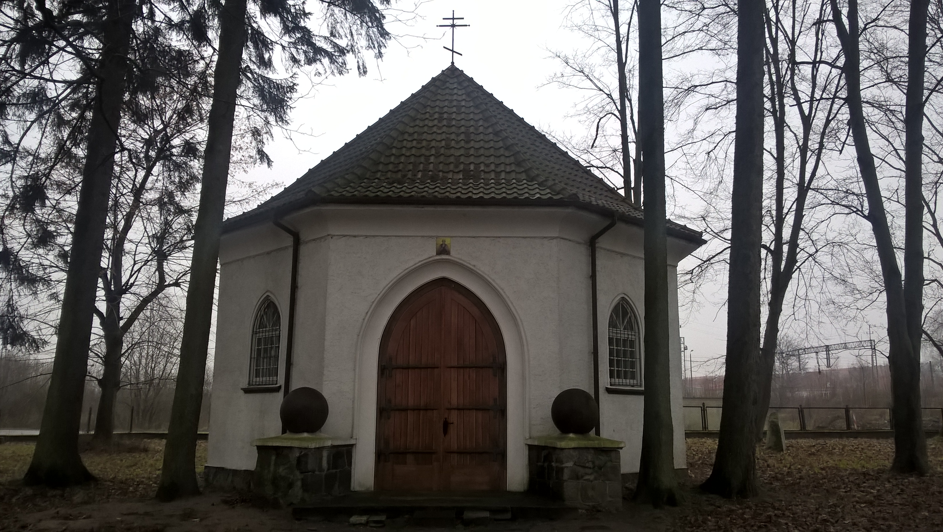 Cerkiew św. Włodzimierza w Morągu, dawna kaplica ewangelicka